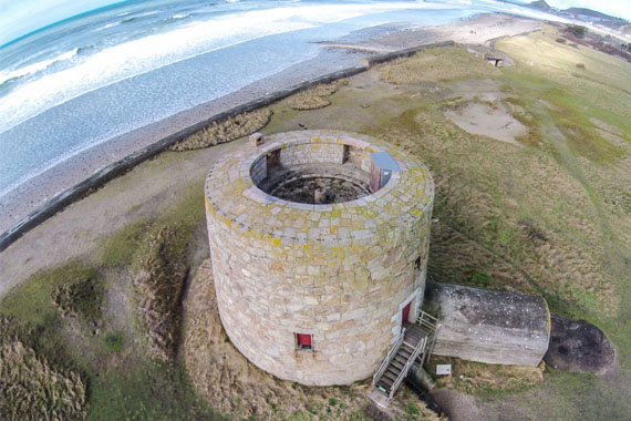 Башня Льюиса (Lewis Tower, Jersey) и панорама залива Сент-Уэн (Saint Ouen, Jersey), остров Джерси.